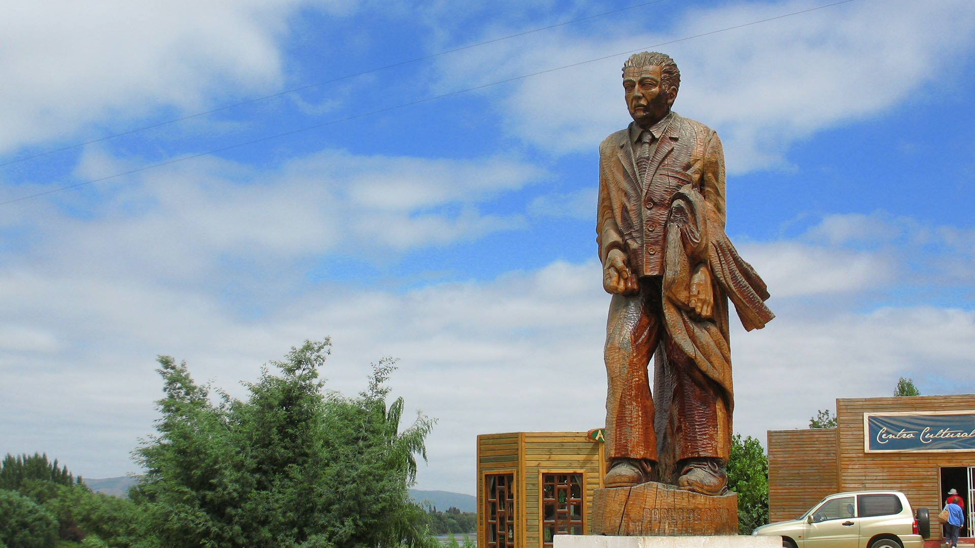 Estatua de madera del poeta chileno Pablo de Rokha, obra del escultor de Vichuquén Kako Calquín. Está ubicada en la comuna de Licantén, a un kilómetro al poniente de la ciudad del mismo nombre, entre la ruta J60 y el río Mataquito.